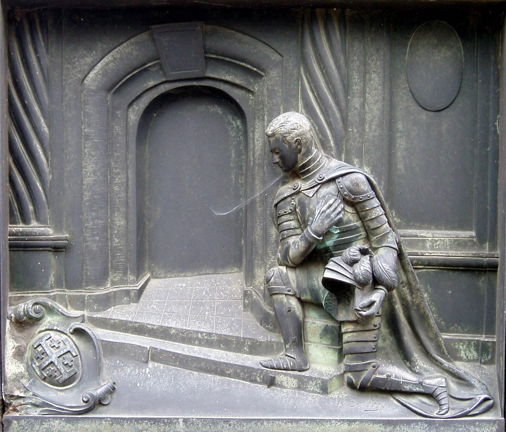 Гробівець родини Трушковських і Закрейсів на Личаківському цвинтарі у Львові. Бронзовий рельєф "Лицар перед Гробом Господнім у Єрусалимі" (1937). Скульптор Броніслав Солтис.